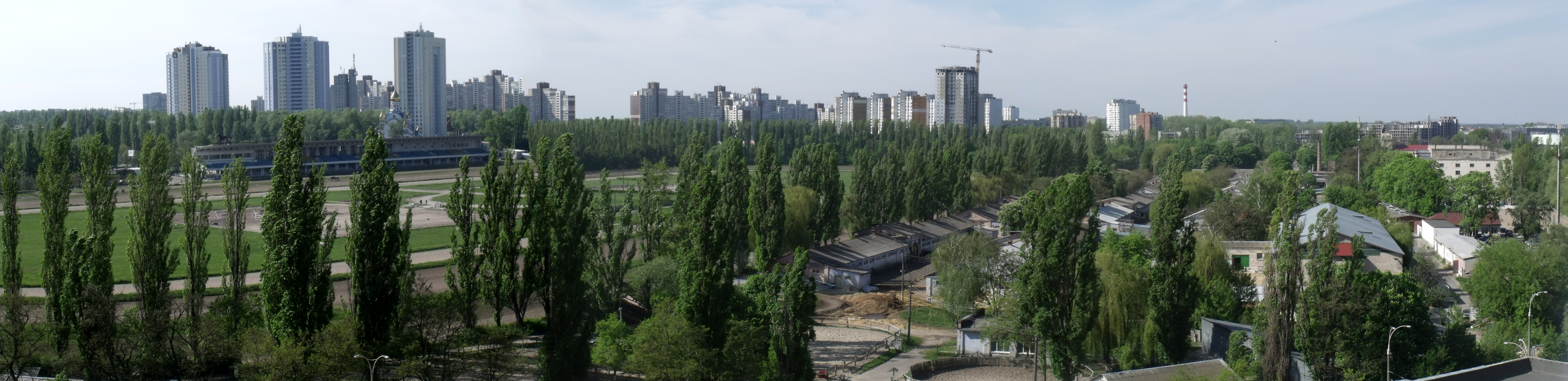 Київський іподром (зі стайнями), Голосіївський район, Теремки, 2016